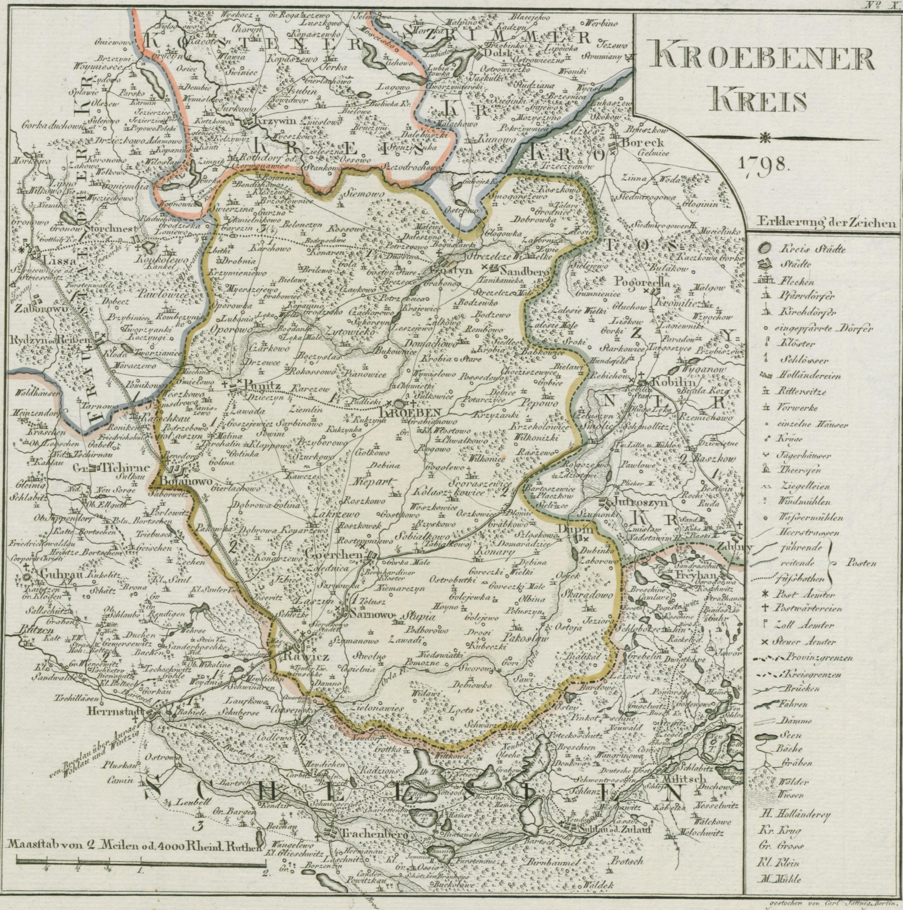 Map of "Kreis Kröben" as of 1798